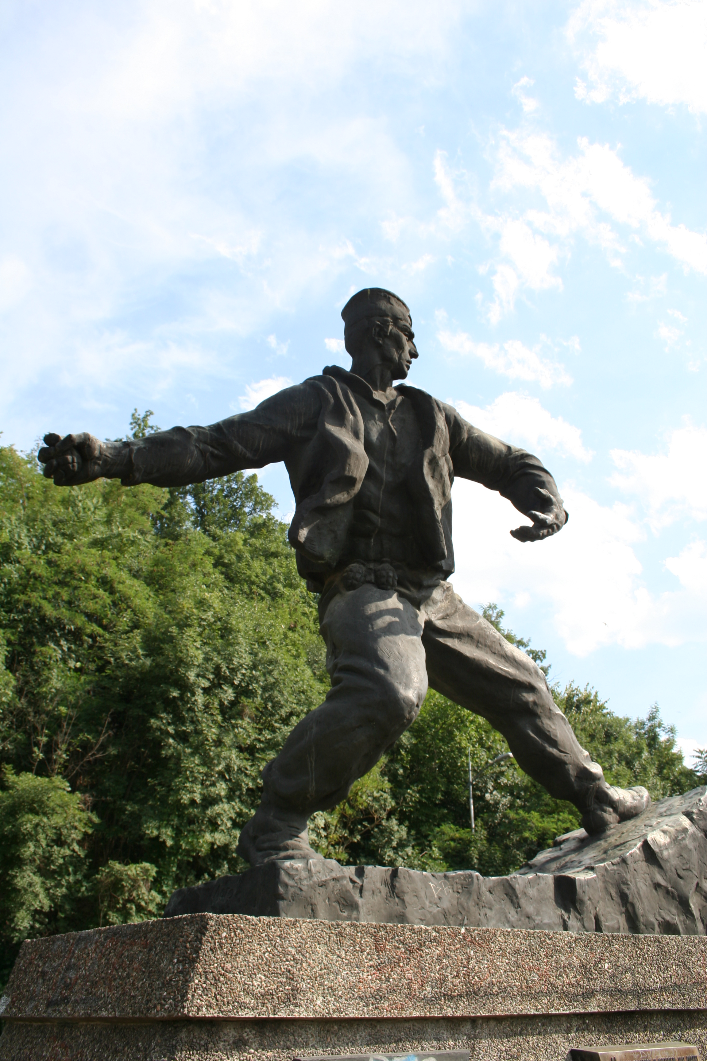 Ljig, spomenici NOB-a